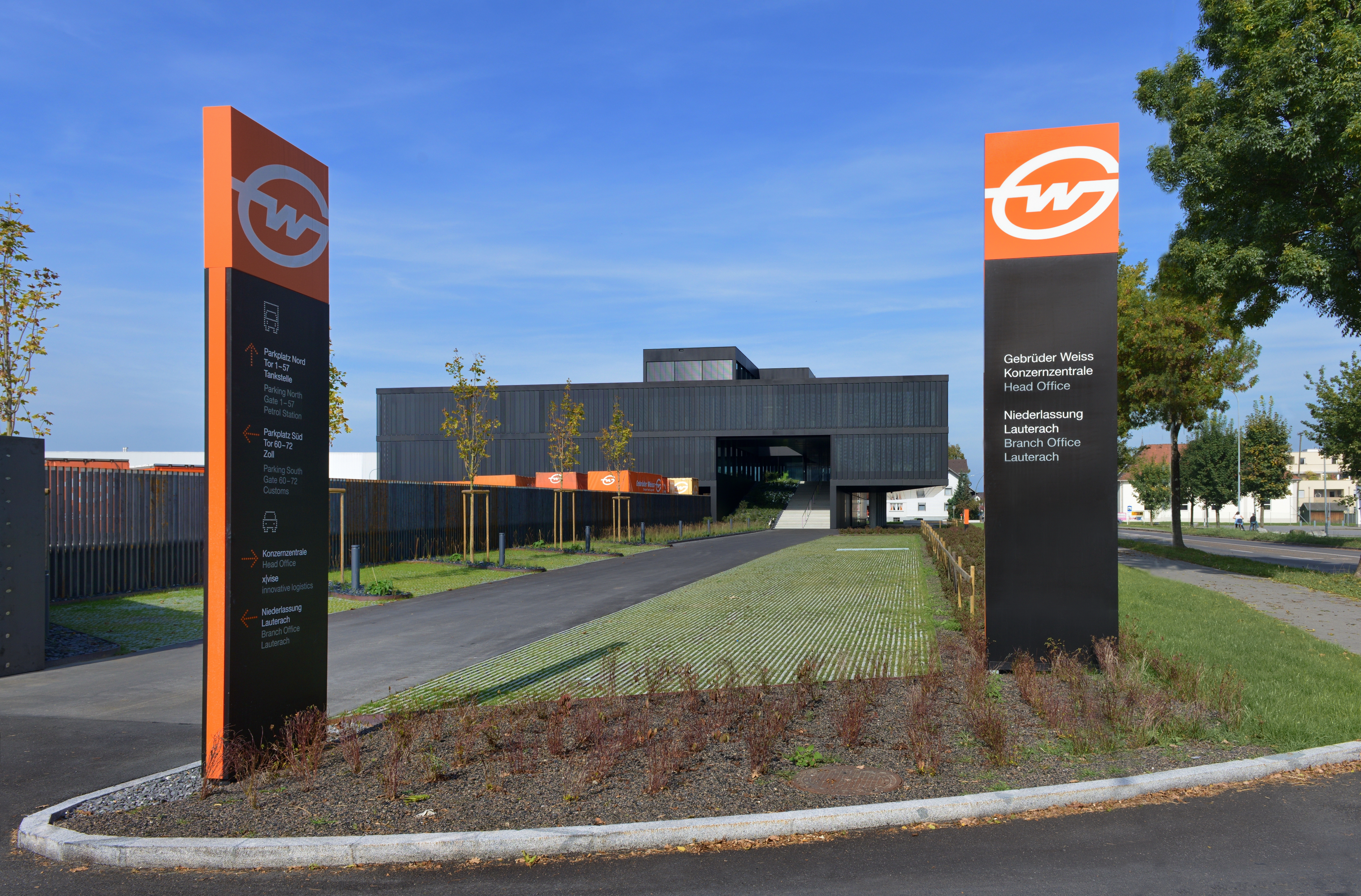 das neue Verwaltungsgebäude Fa.Gebrüder Weiss in Lauterach, Vorarlberg.